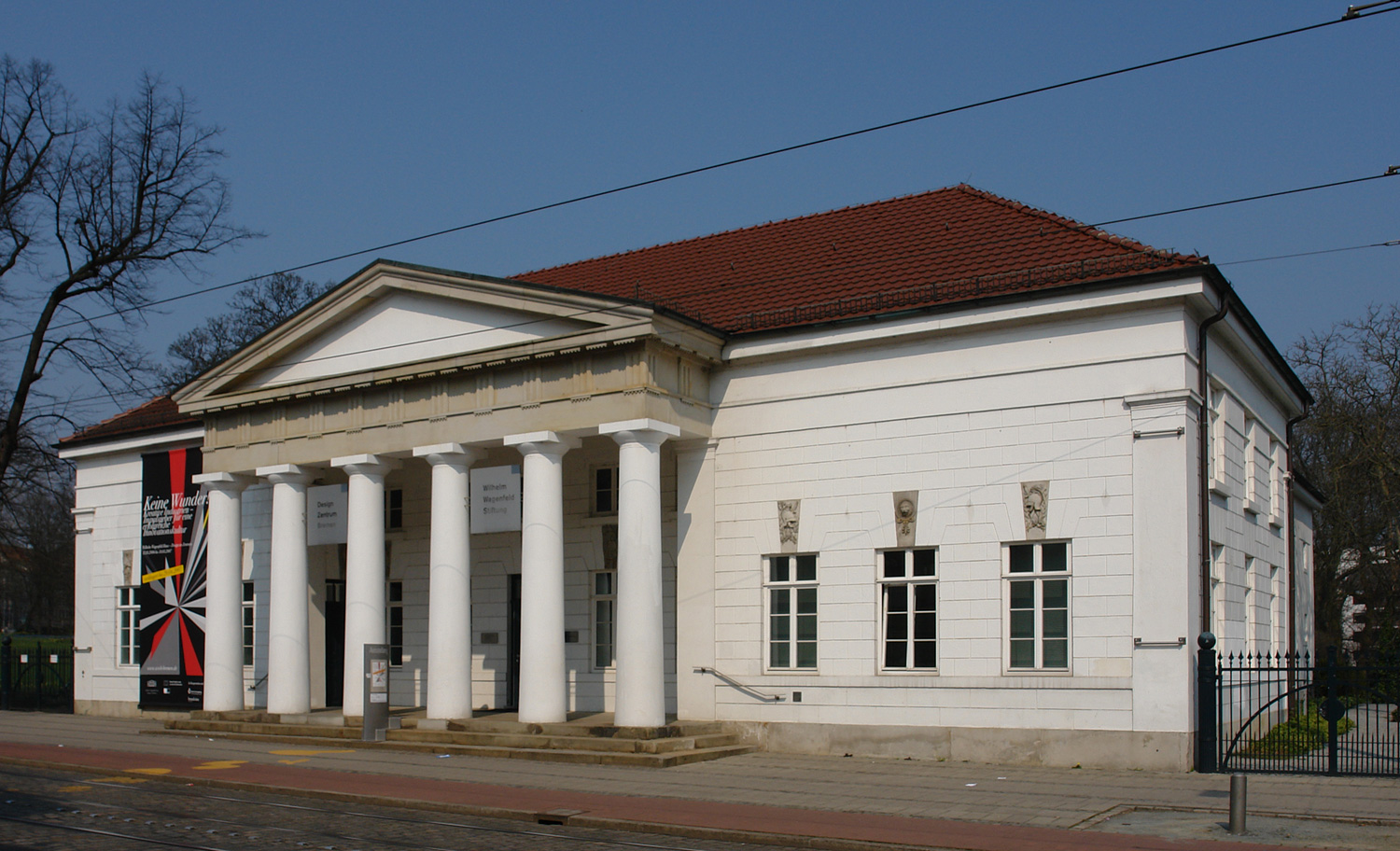 Ostertorwache (an den Wallanlagen) in Bremen, heute Wilhelm-Wagenfeld-Haus. Architekt Friedrich Moritz Stamm (1794–1843)Das abgebildete Objekt ist ein geschütztes Kulturdenkmal in der Freien Hansestadt Bremen, mit der Nr. 0085 beim Landesamt für Denkmalpflege registriert.